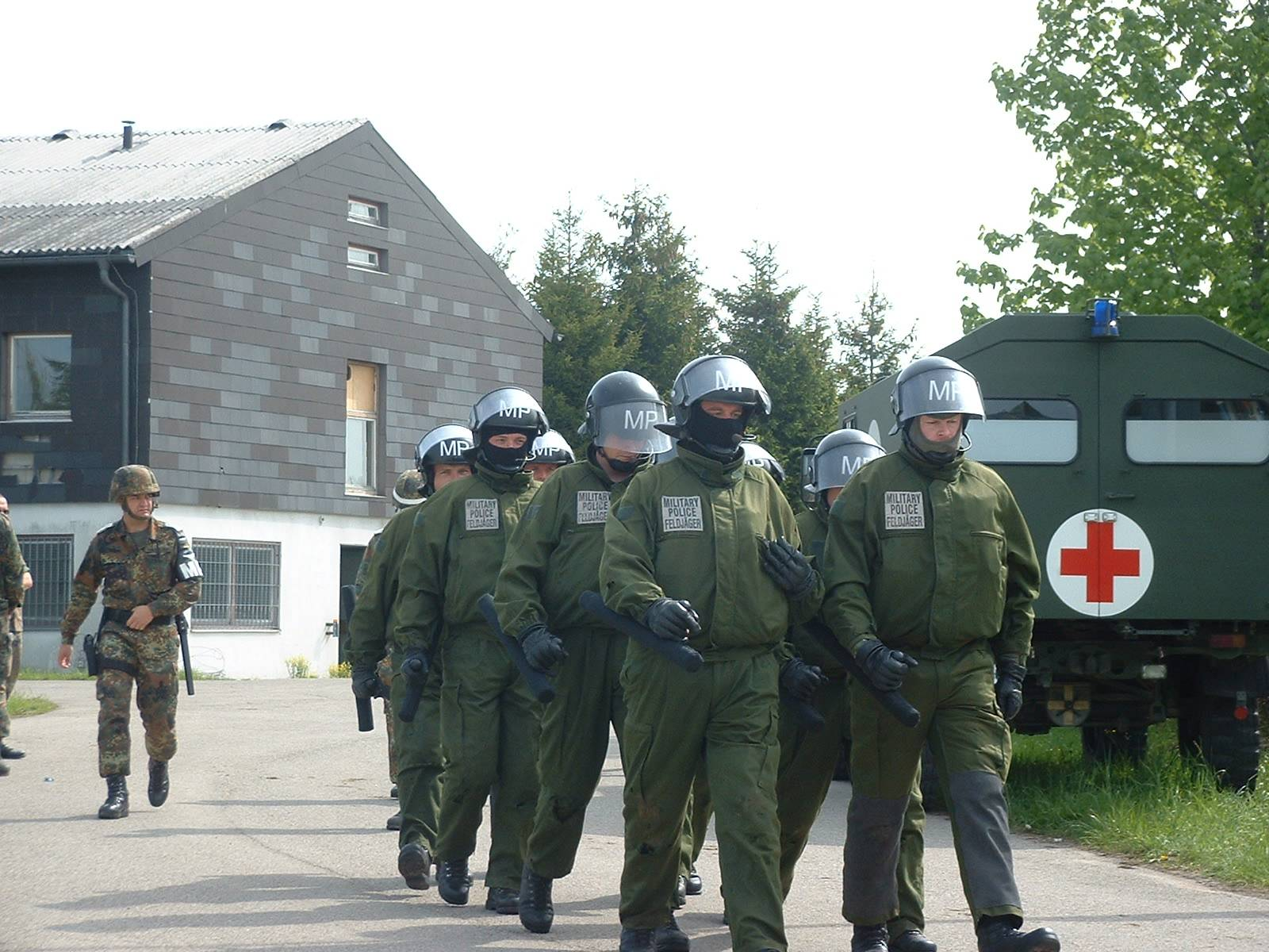 Feldjäger als Greiftrupp/ CRC auf dem Weg zum Einsatzort